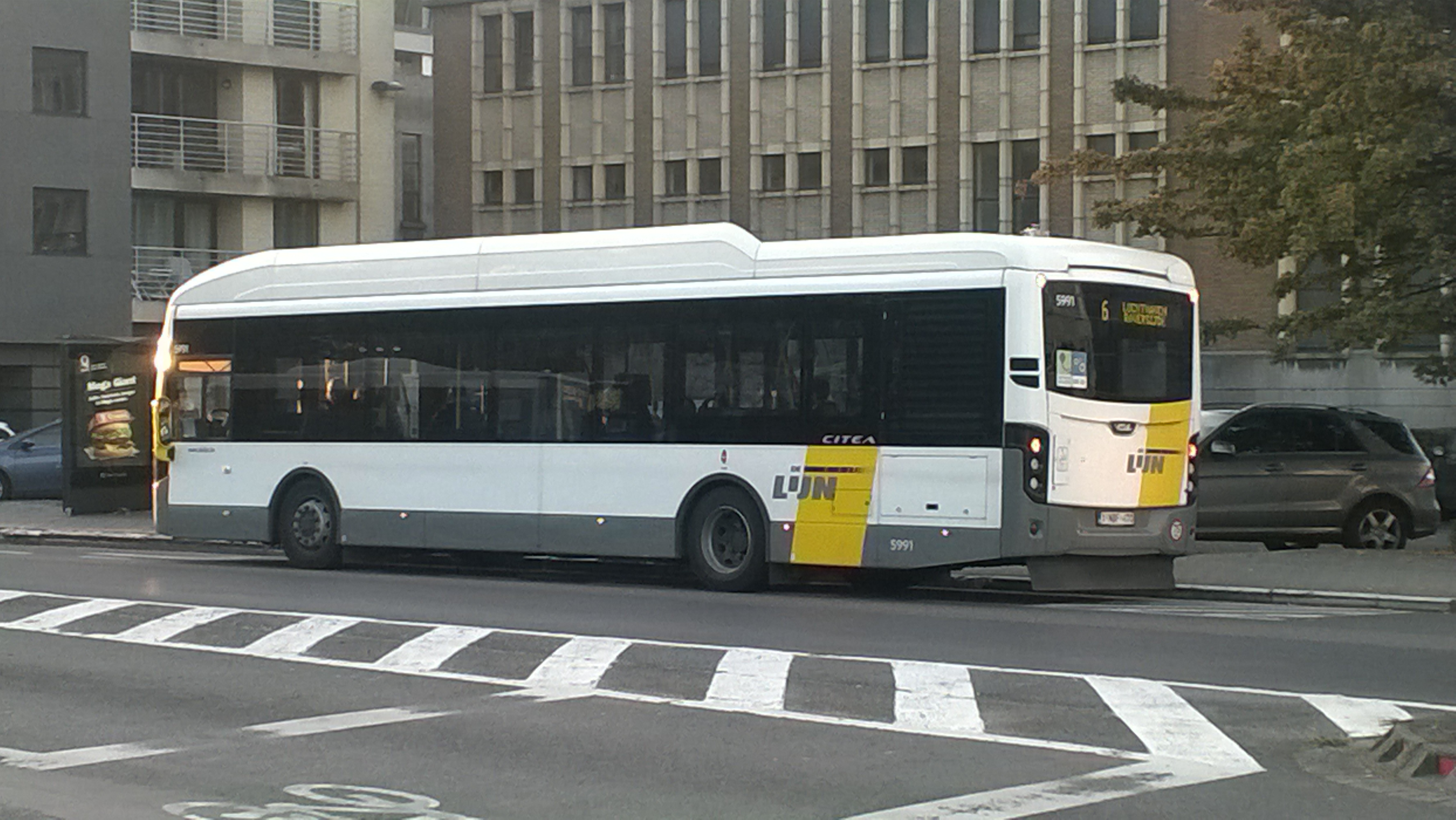 Een hybride CITEA-standaardbus van VDL/Jonckheere aan het Gerechtshof te Oostende